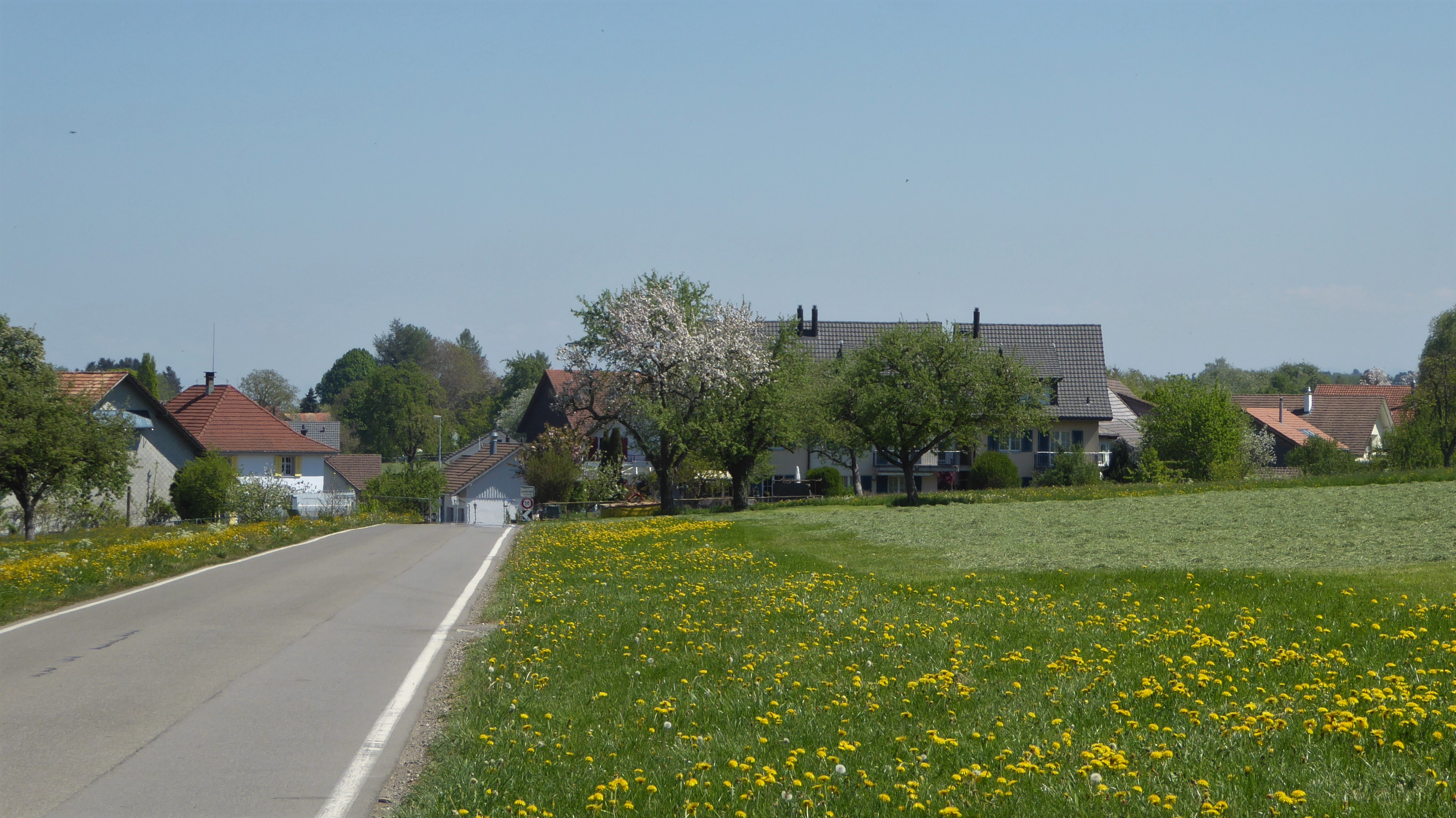 Lanterswil